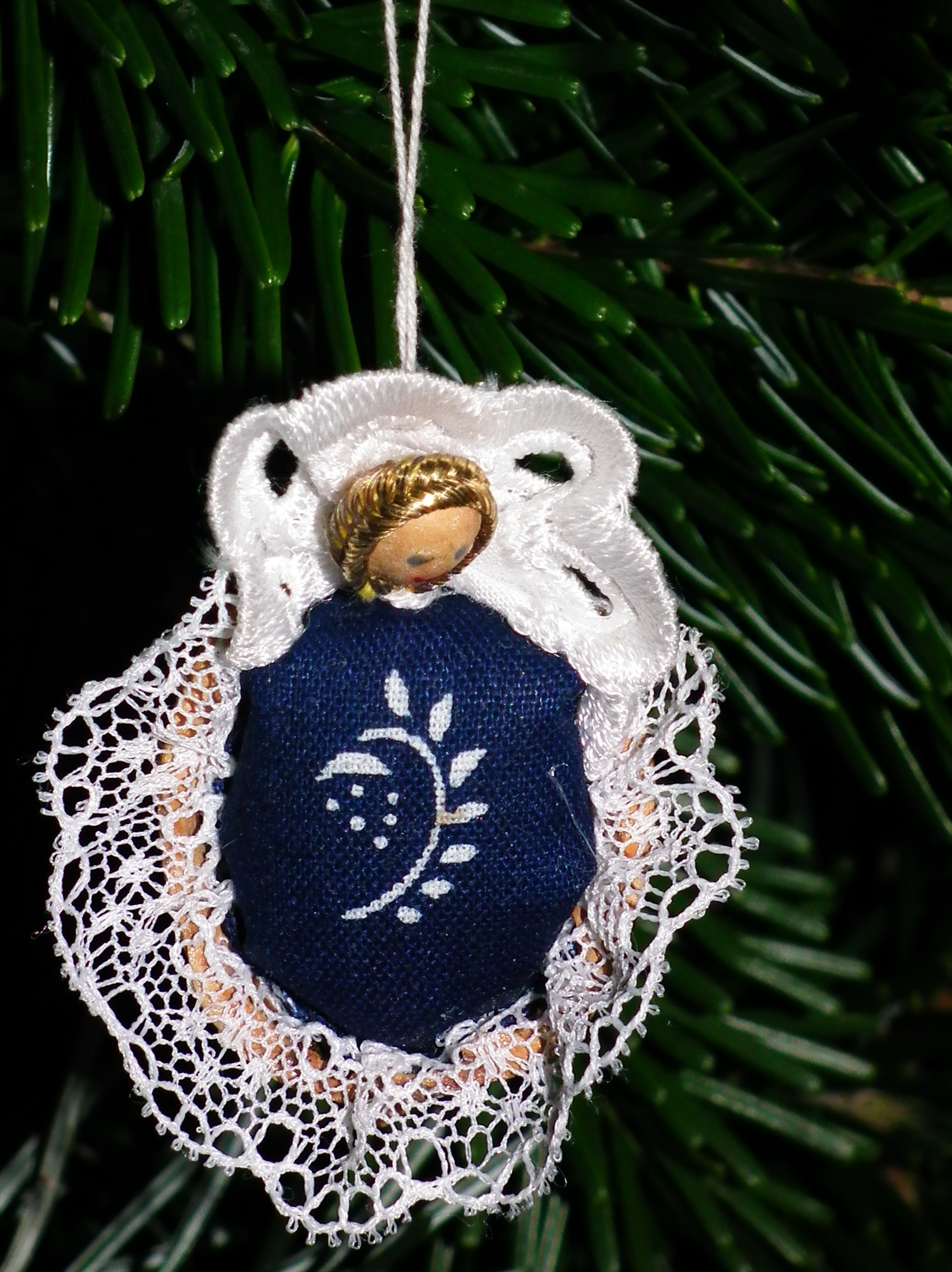 Weihnachtsbaumschmuck aus Ungarn: Christkind in einer Walnussschale